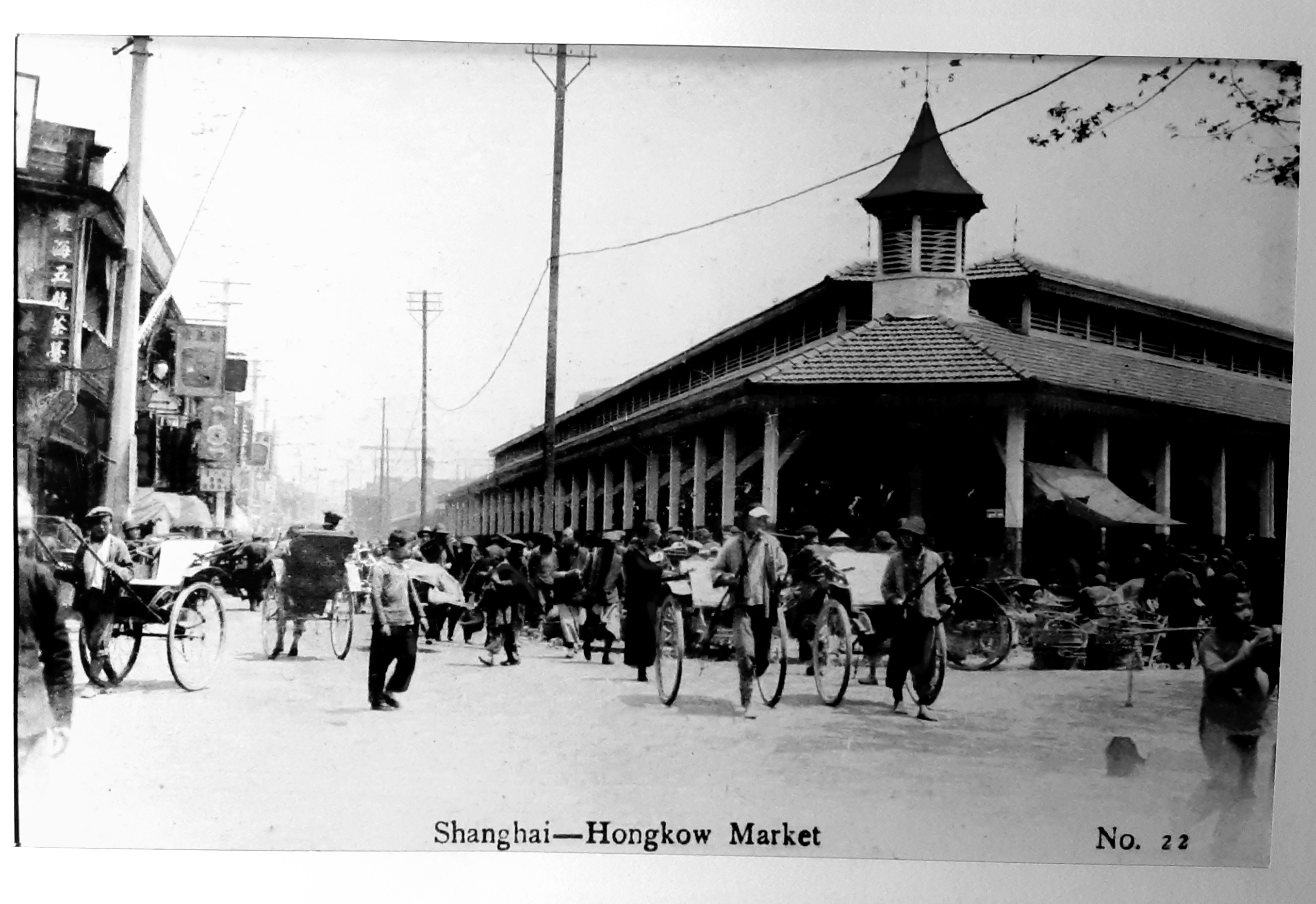 上海虹口菜场老照片